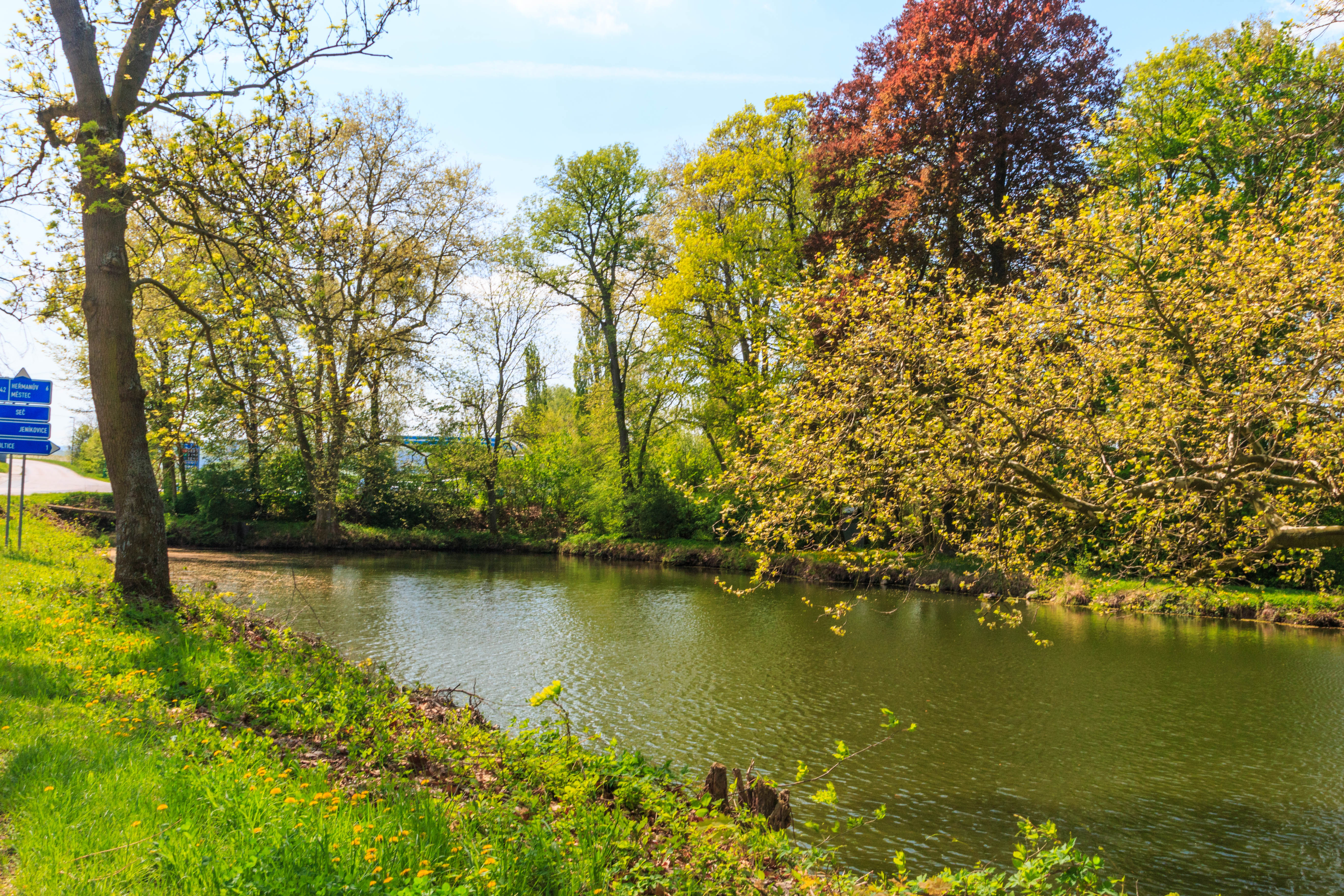 Rybník u Cyklosu v Cholticích Project: Vodstvo.